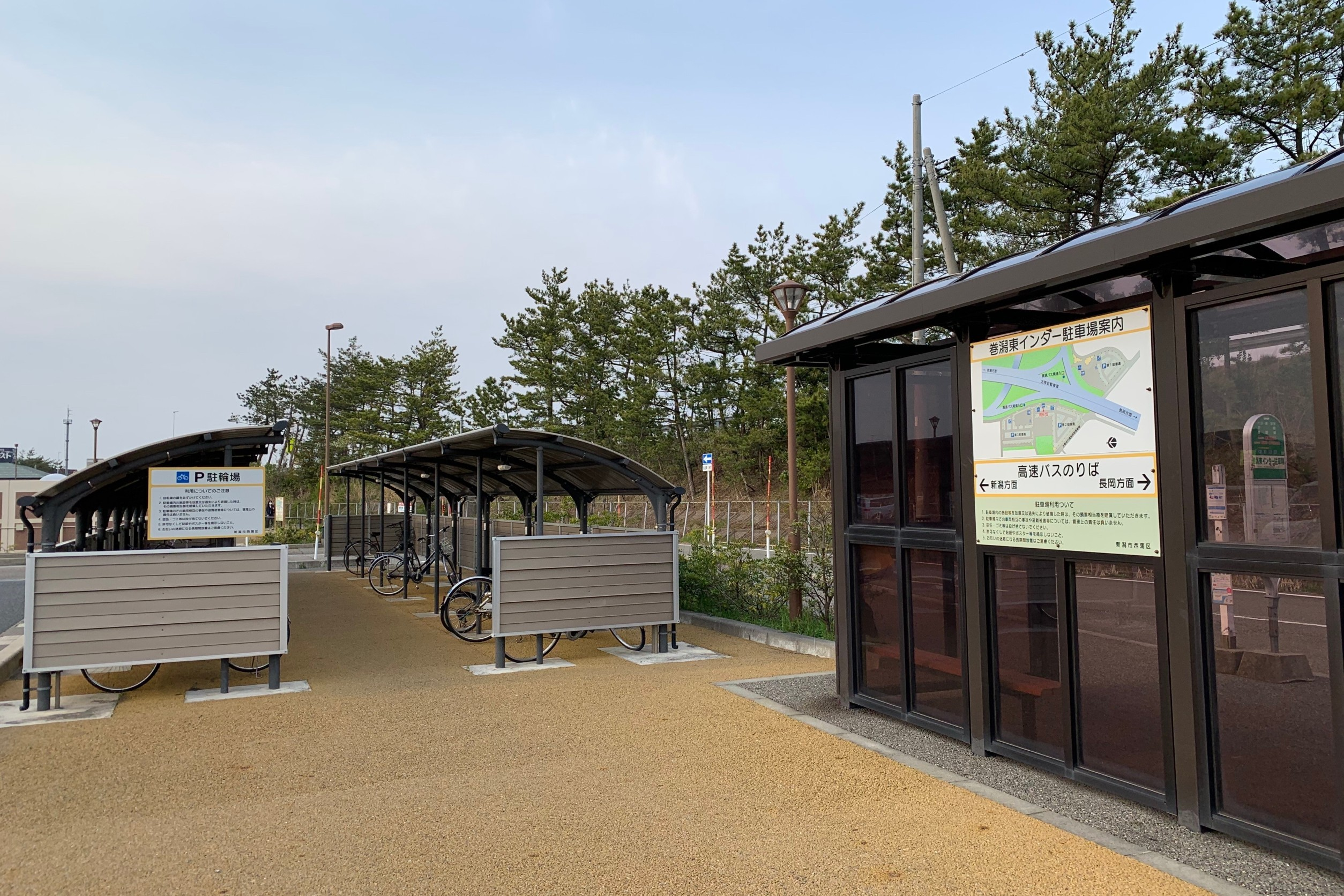 北陸自動車道・巻潟東バスストップ脇の無料パークアンドライド駐車場・駐輪場（新潟市西蒲区，2020年4月）